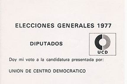 Logo de la UCD de una papeleta electoral de 1977